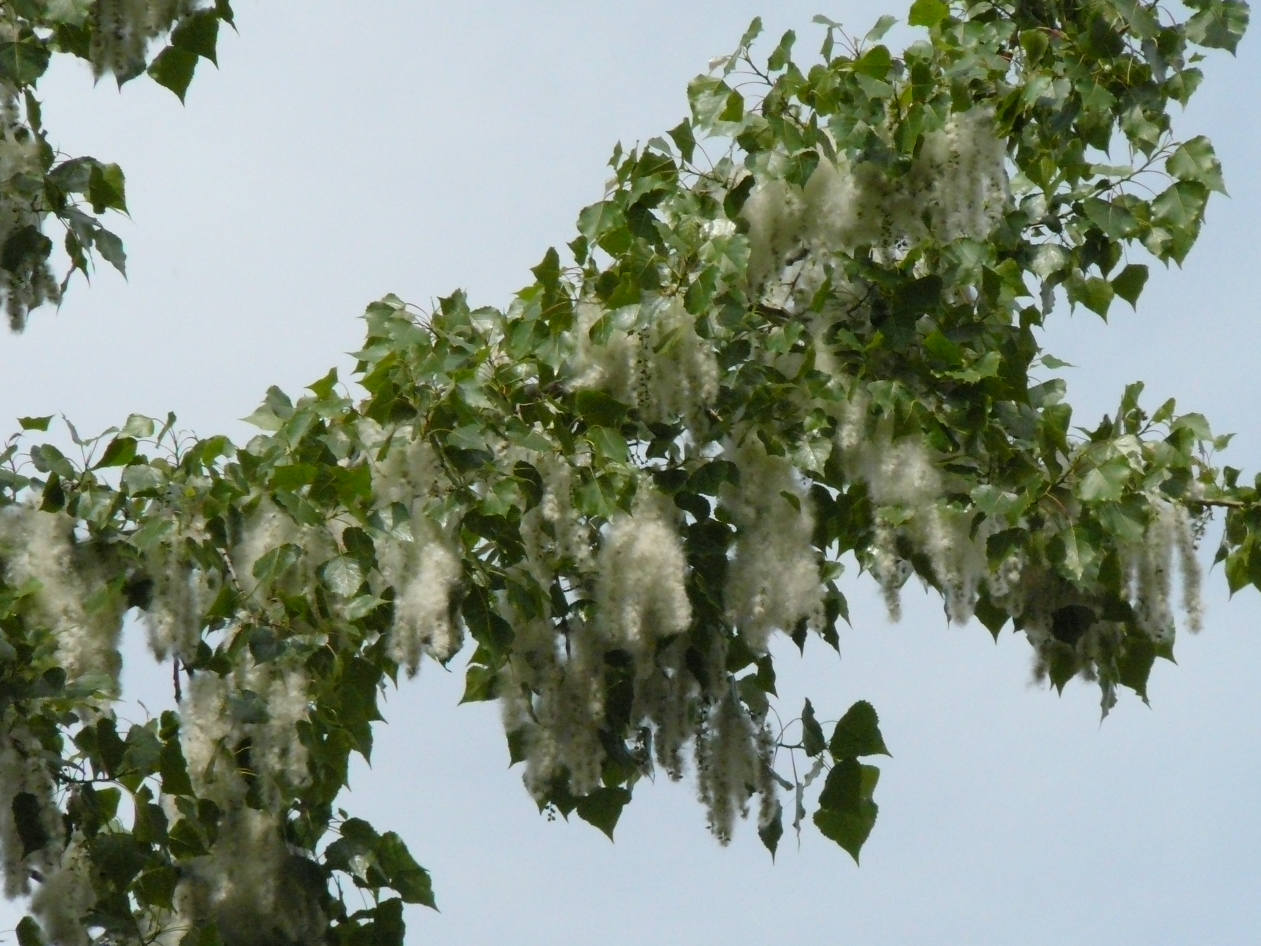 Populus × canadensis; peuplier en printemps